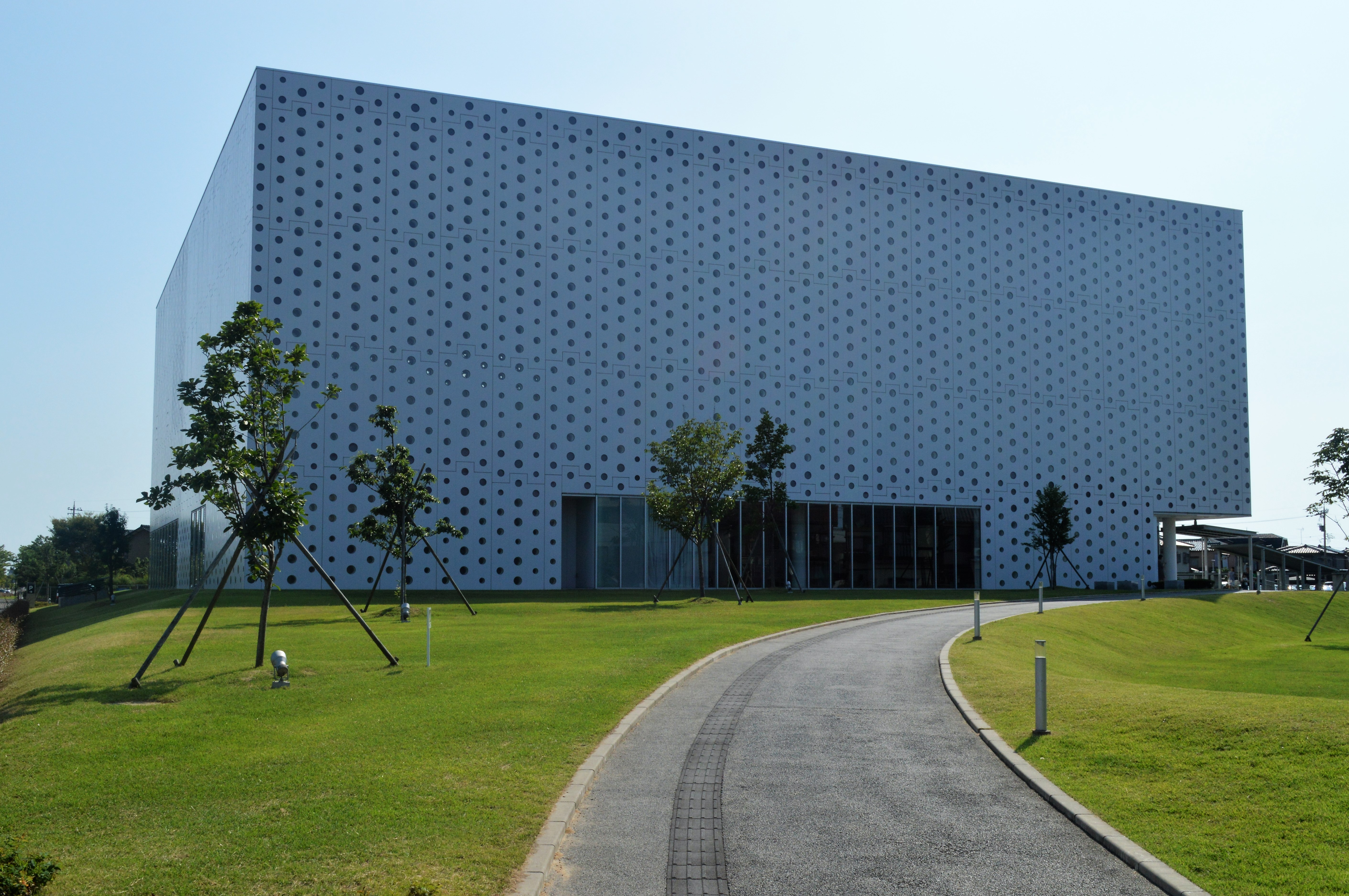 石川県金沢市 金沢海みらい図書館。金沢市図書館のひとつ。